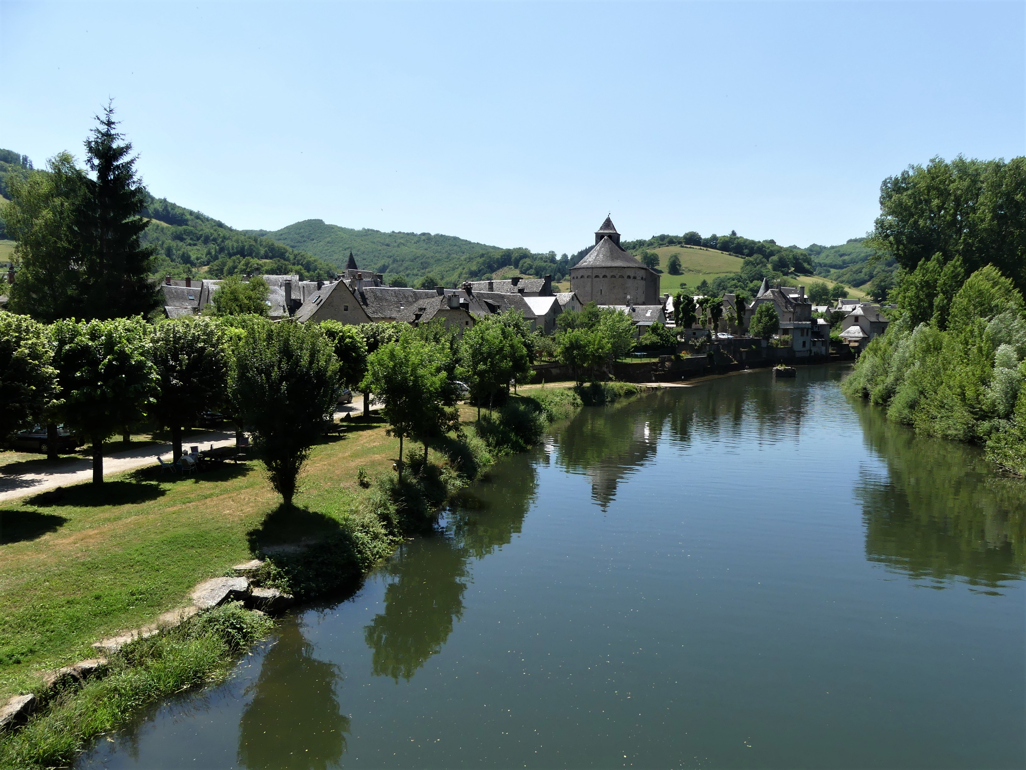 Le Lot en limites de Sainte-Eulalie-d'Olt (à gauche) et Saint-Geniez-d'Olt (à droite), Aveyron, France. Vue prise depuis le pont de Sainte-Eulalie en direction de l'aval.